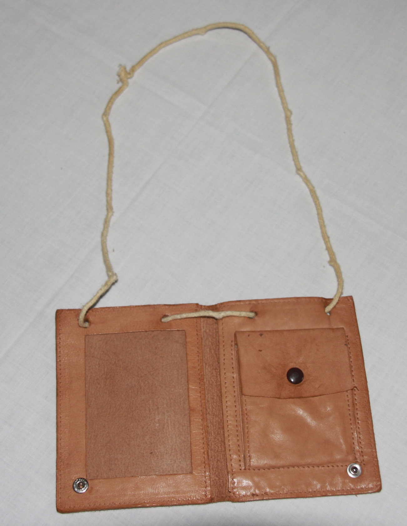 Ein Brustbeutel aus Leder, in geöffnetem Zustand